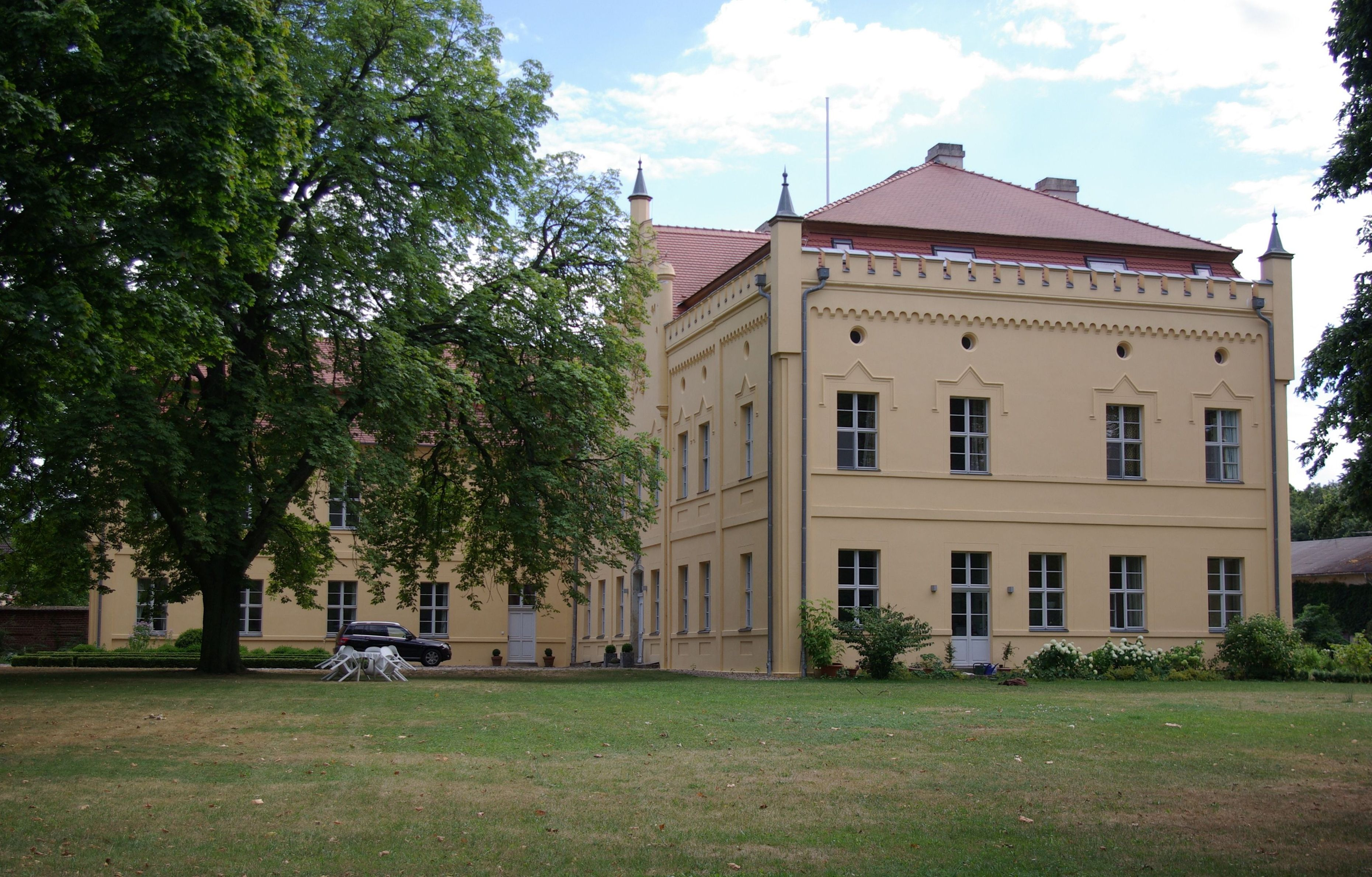 Nennhausen in Brandenburg. Das Schloss steht unter Denkmalschutz.